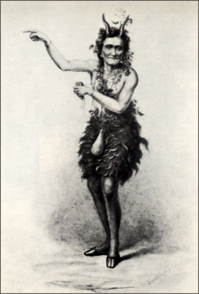 Johann Nepomuk Nestroy als Pan in Offenbachs „Daphnis und Chloe“